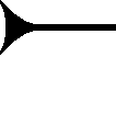 Cuneiform sign AŠ